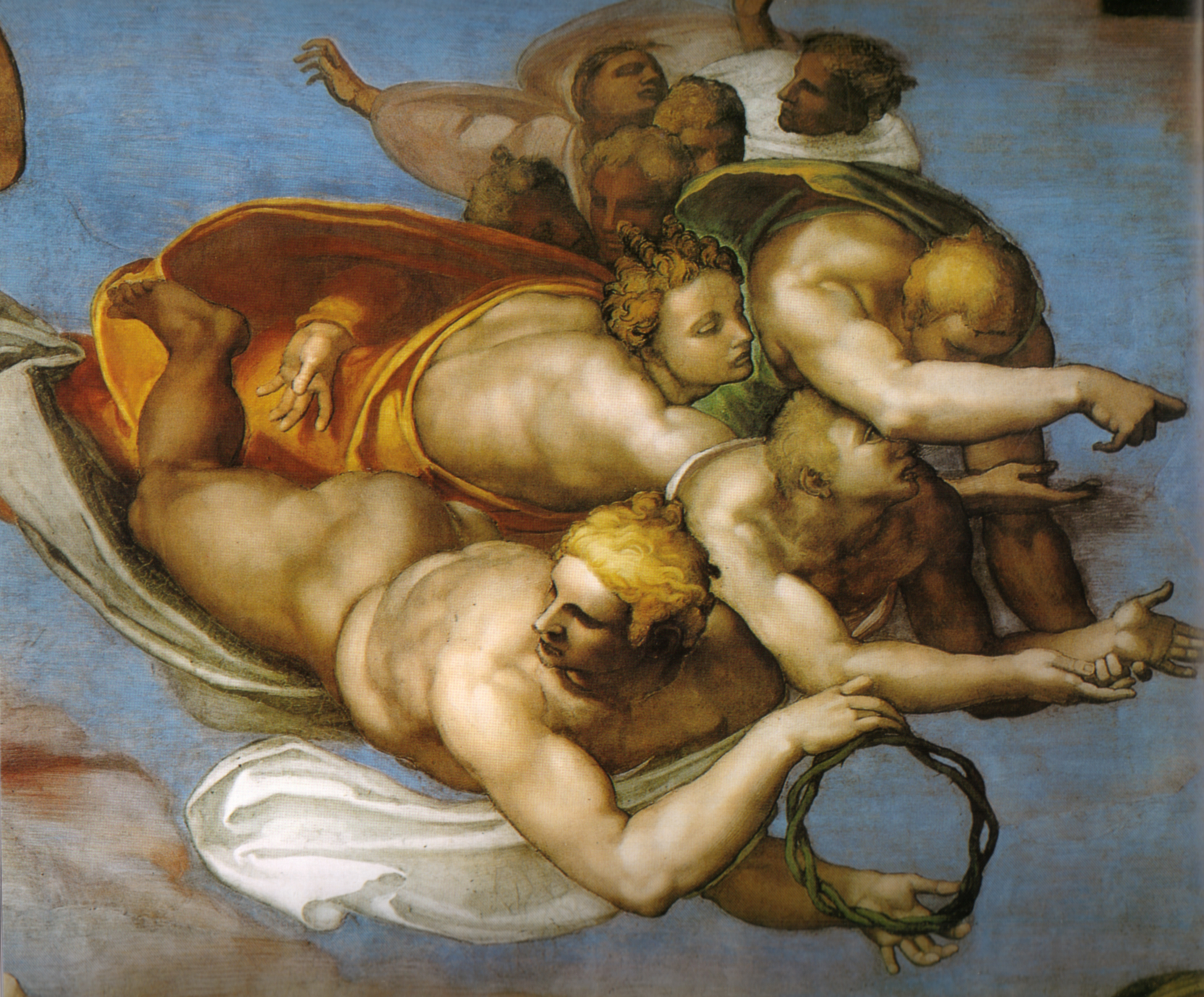 MICHELANGELO Buonarroti Last Judgment Fresco, 1370 x 1220 cm Cappella Sistina, Vatican